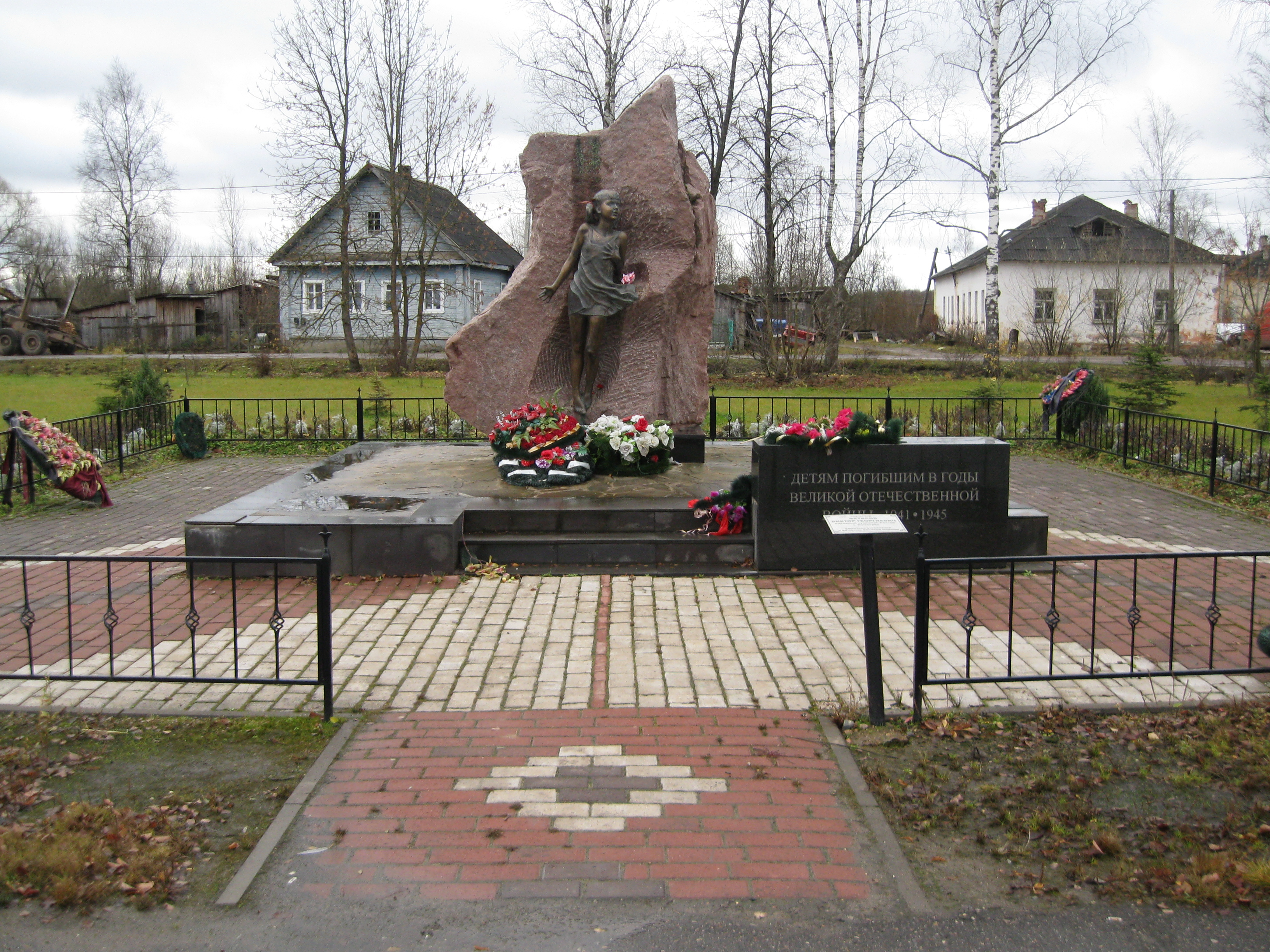 Памятник детям, погибшим во время Великой Отечественной войны в село Лычково Демянского района Новгородской области